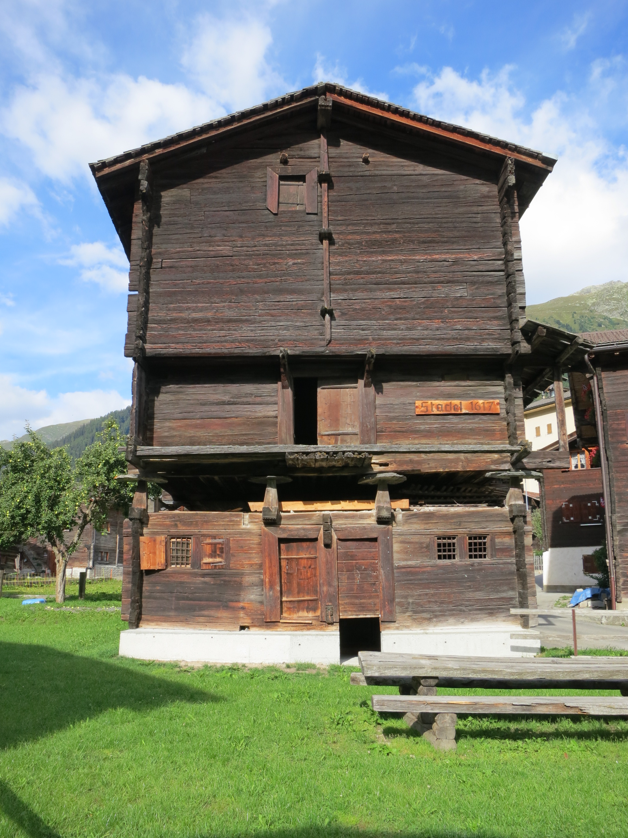 Stadel, Reckingen VS, Schweiz